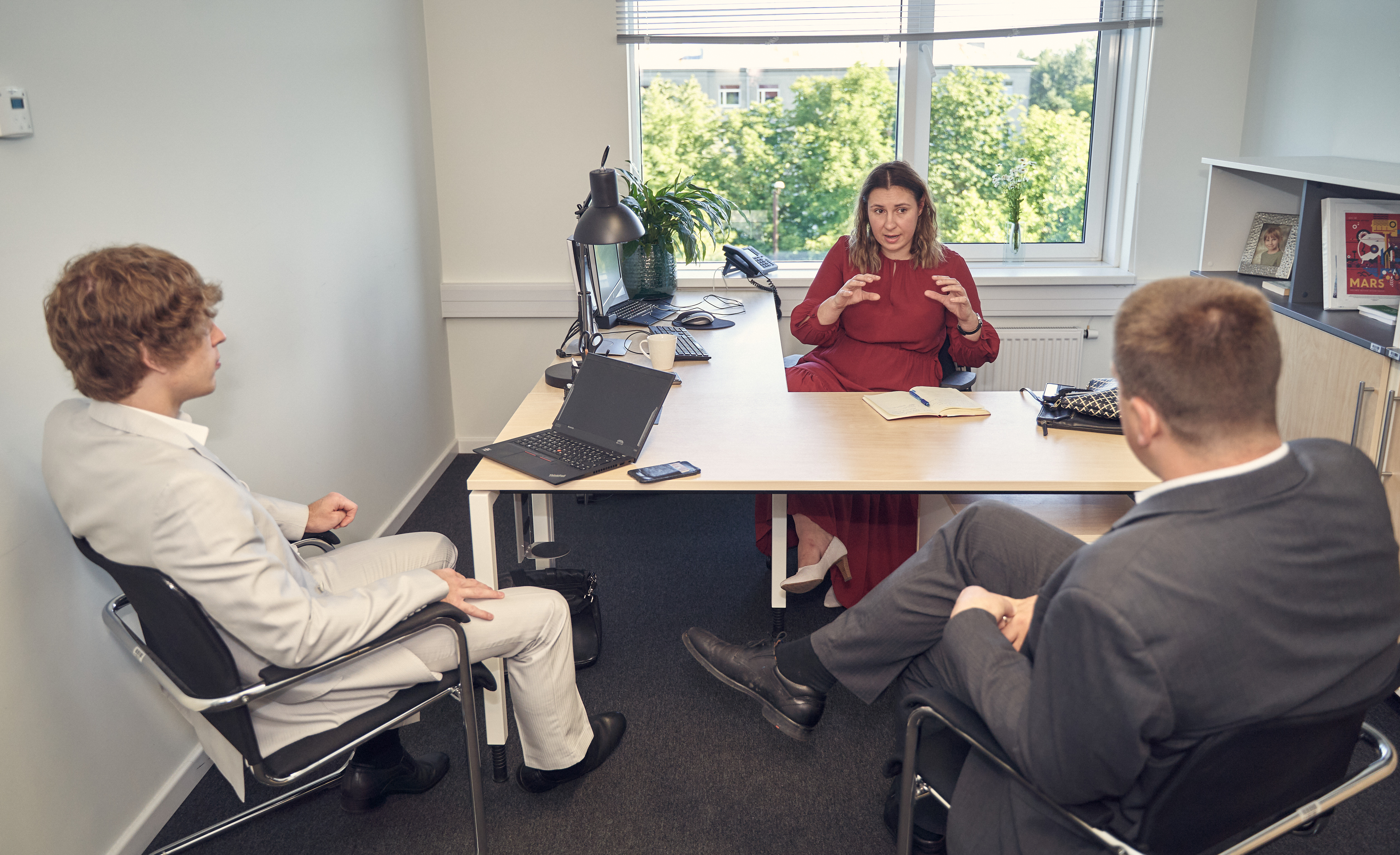 Terviseameti külastus 16. juulil 2020. Tanel Kiik ja Jüri Ratas vestlemas Terviseameti peadirektori kohusetäitja Mari-Anne Härmaga.